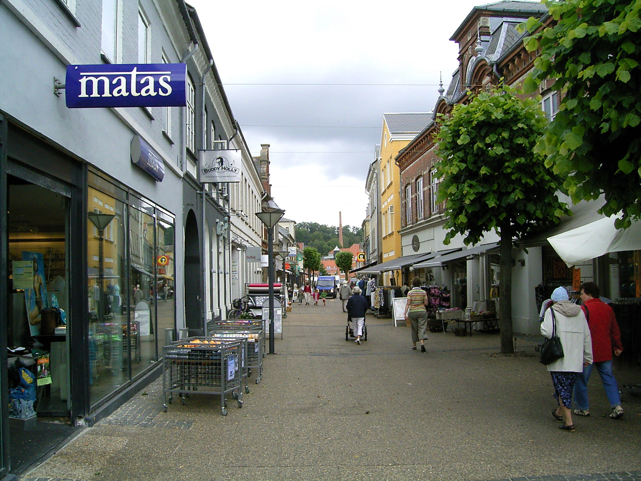 Adelgade in Hobro